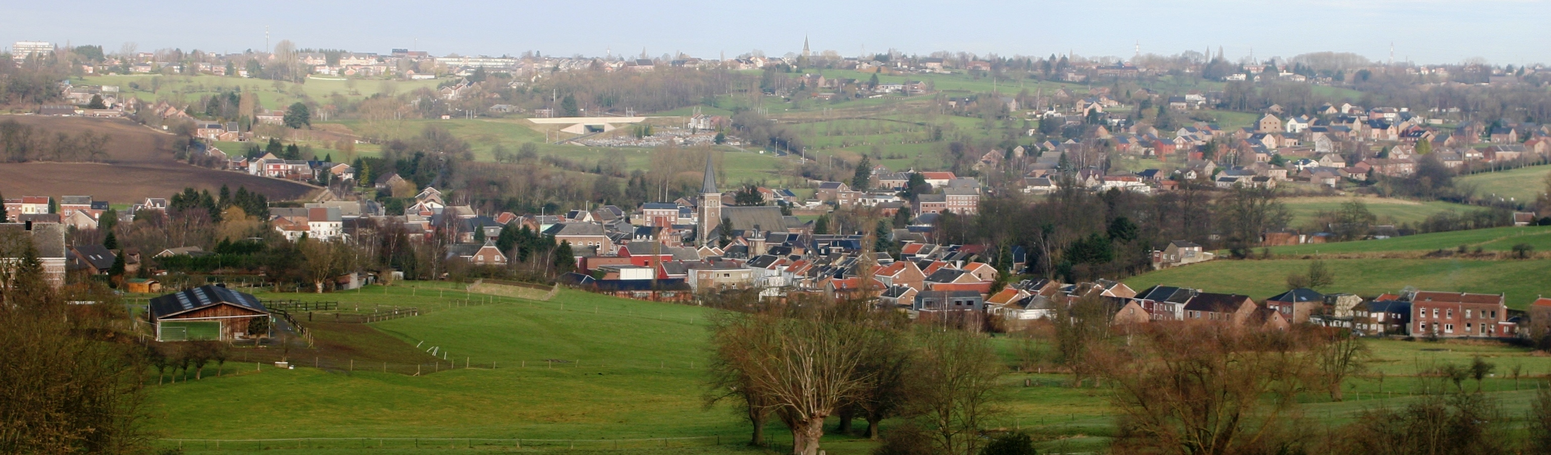 Vu vu Süden op Soumagne-Vallée.